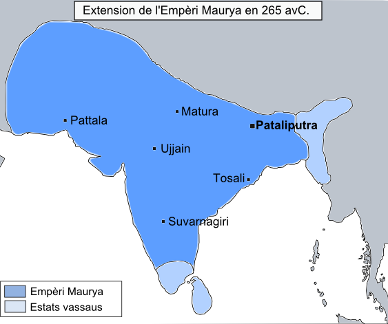 Extension de l'Empèri Maurya e vilas principalas vèrs 265 avC.